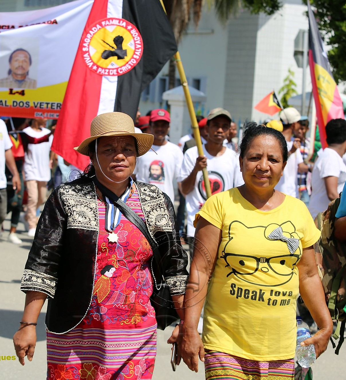 Flagge der Sagrada Familia auf dem Veteranentag